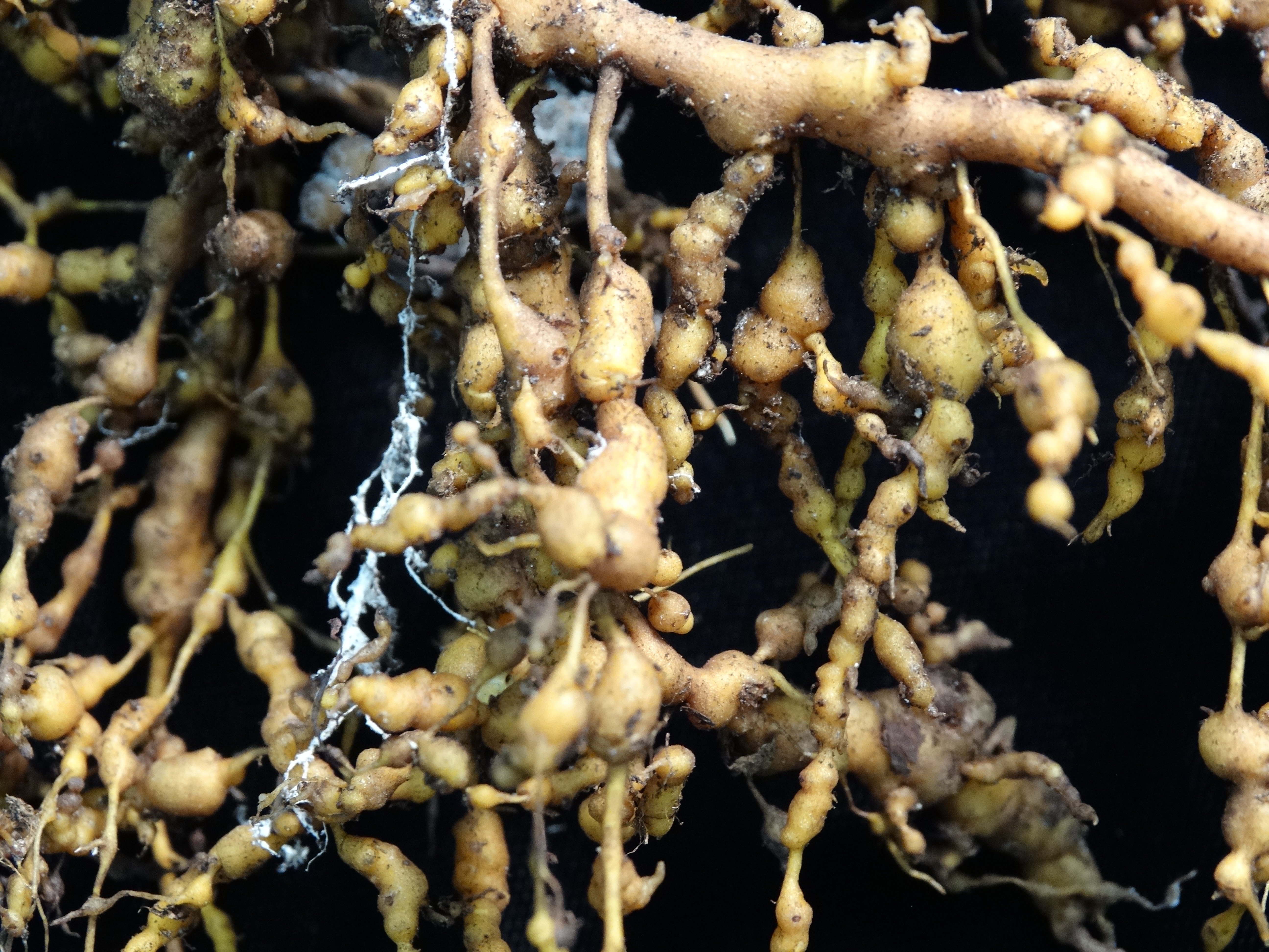 Meloidogyne sp. on Morinda citrifolia (noni)